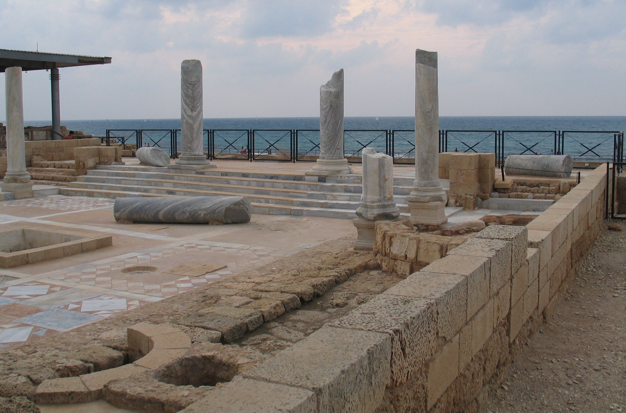 Caesarea Maritima, Israel.